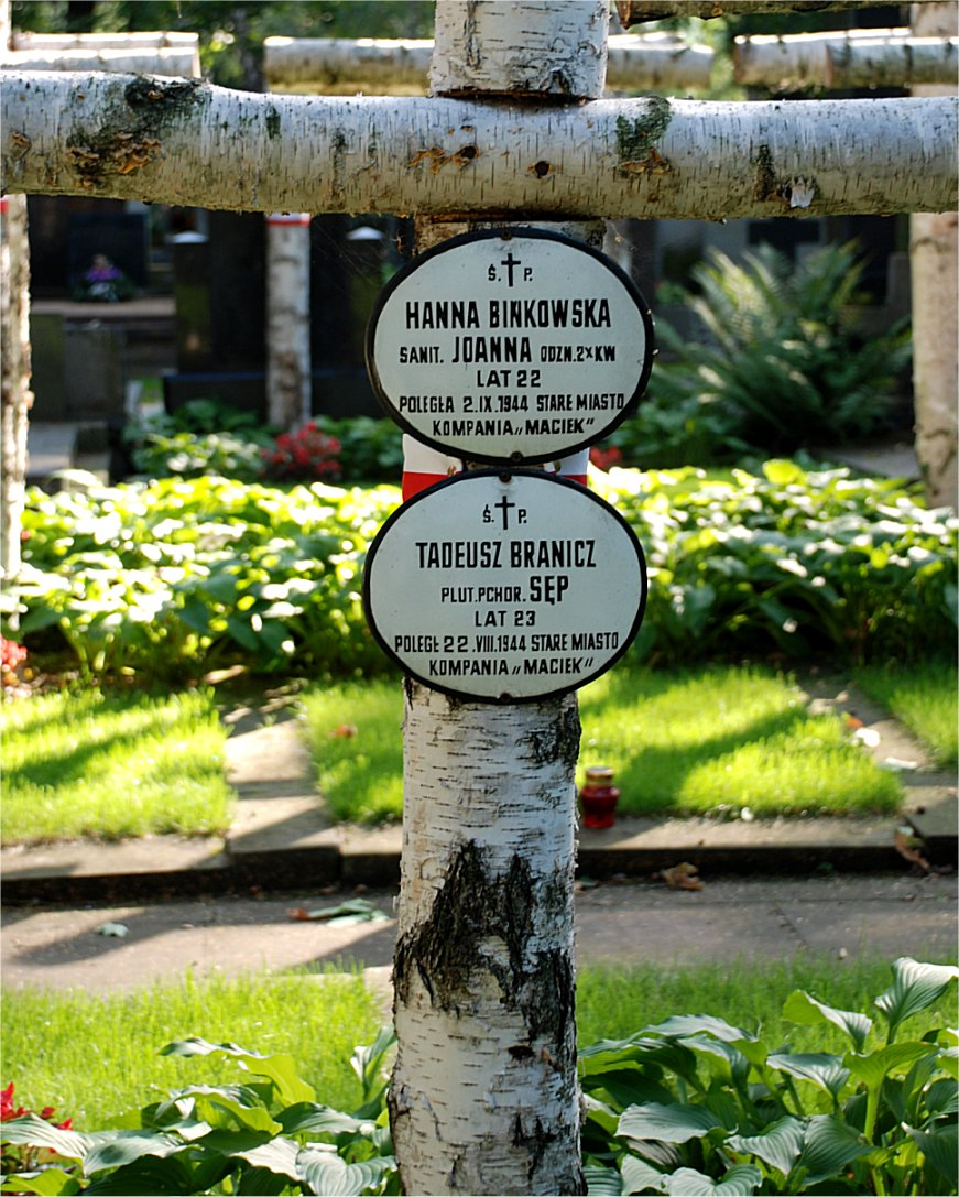 Hanna Bińkowska, Tadeusz Branicz, Powązki w Warszawie